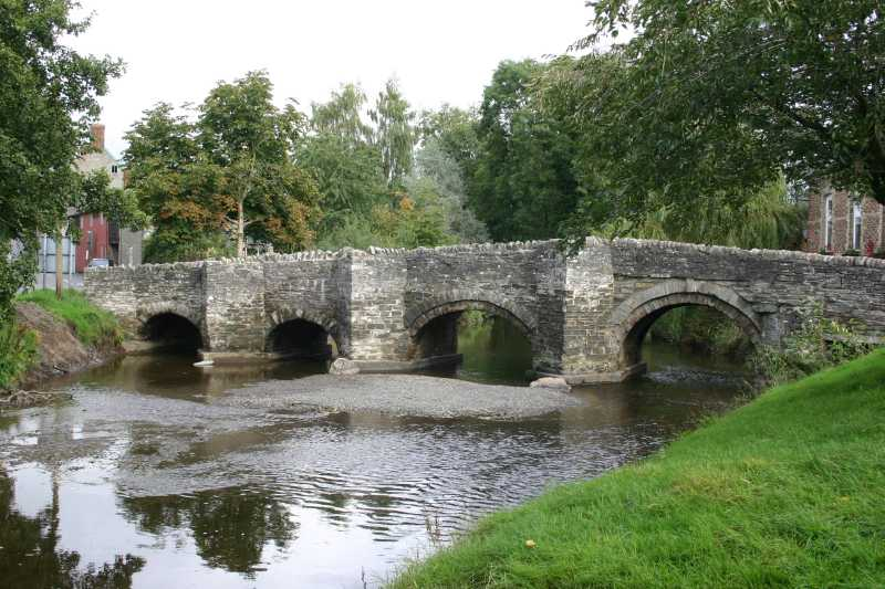 Clun Bridge.